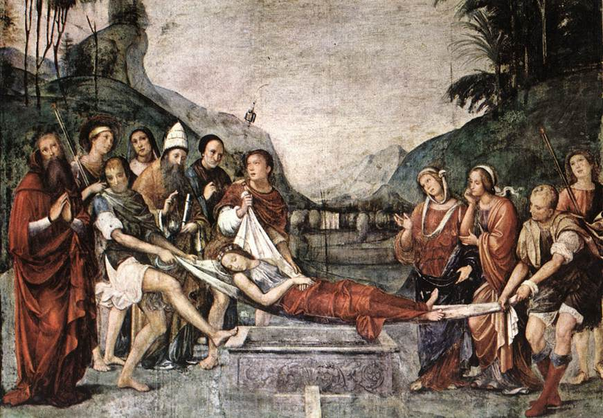 "Den heliga Cecilias begravning" (fresk; 1504-1506). Oratorio di Santa Cecilia, Bologna.